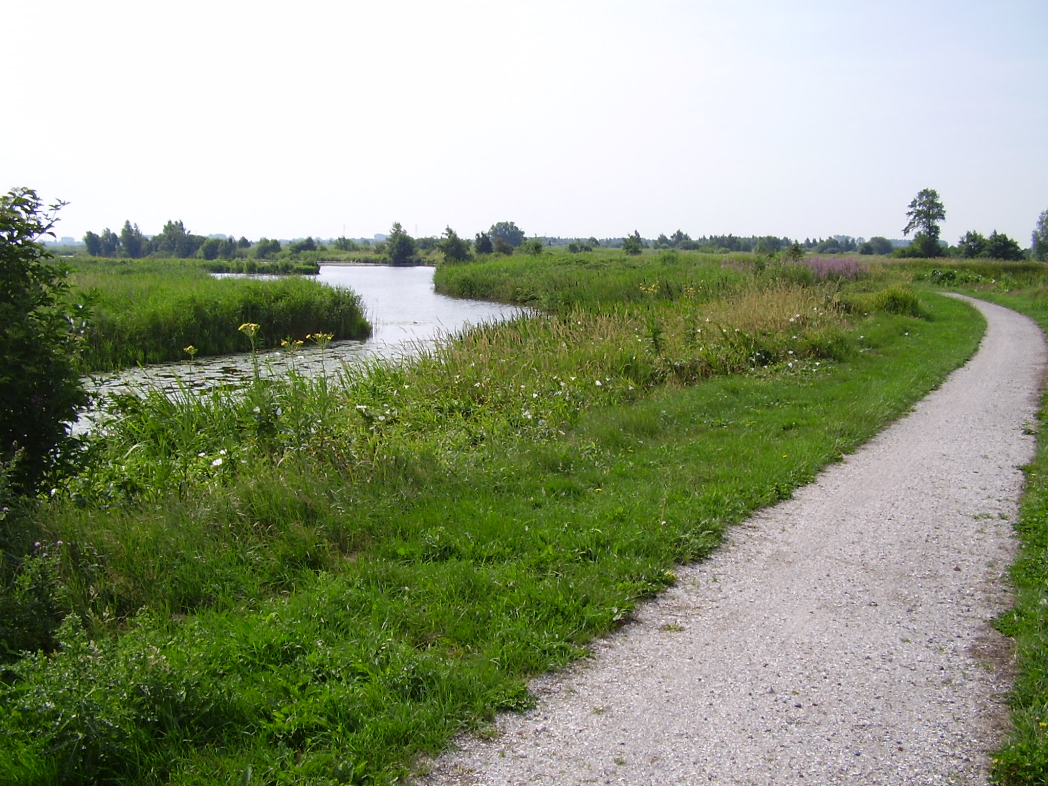 Fietspad door het Brandemeer